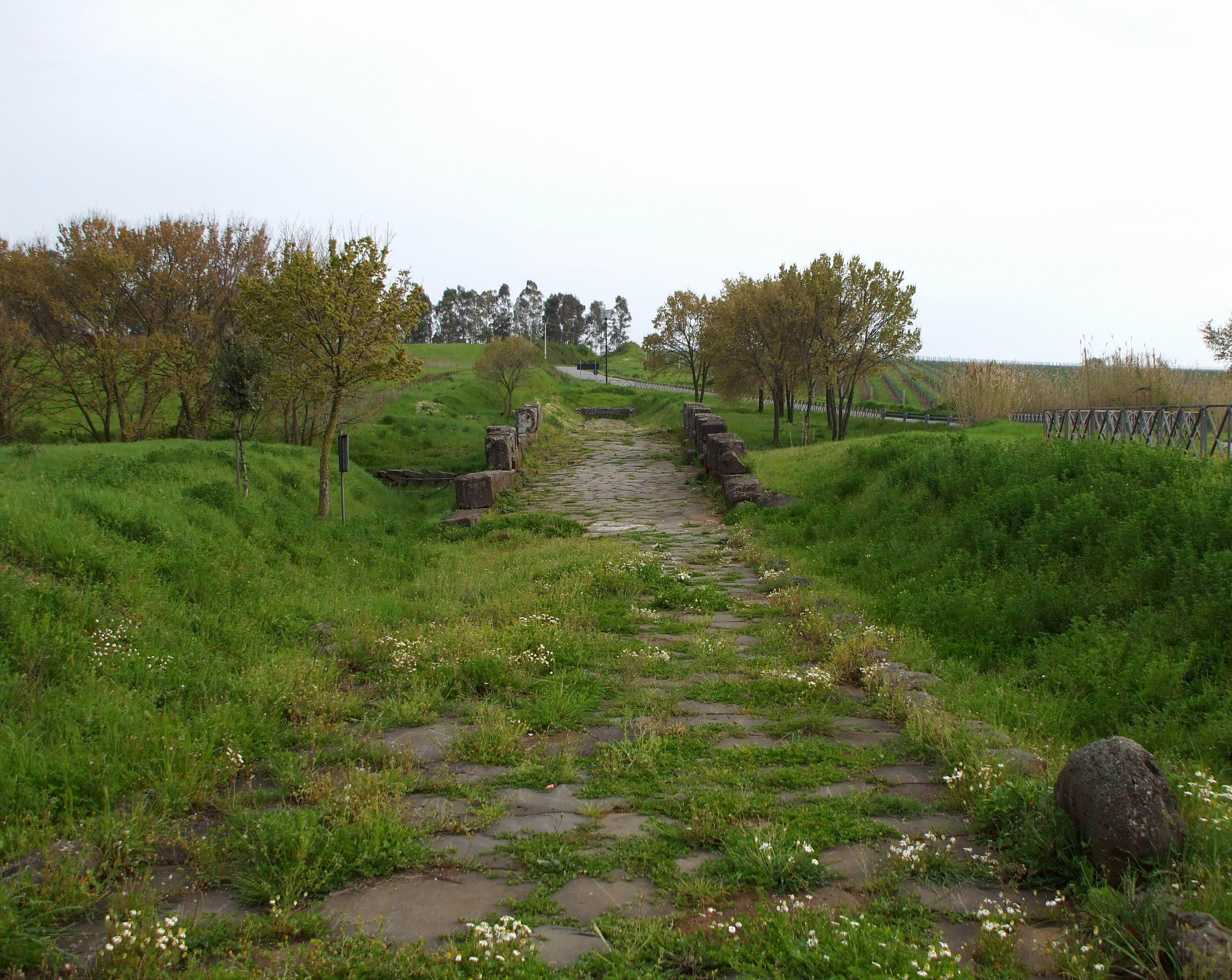 Lanuvio ponte Loreto e via Astura